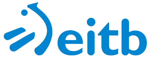 logo eitb